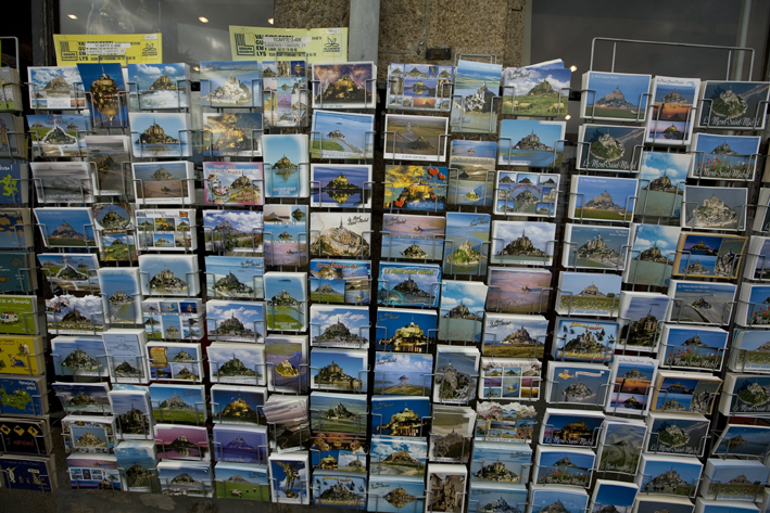 Cartes postales récentes du Mont Saint-Michel